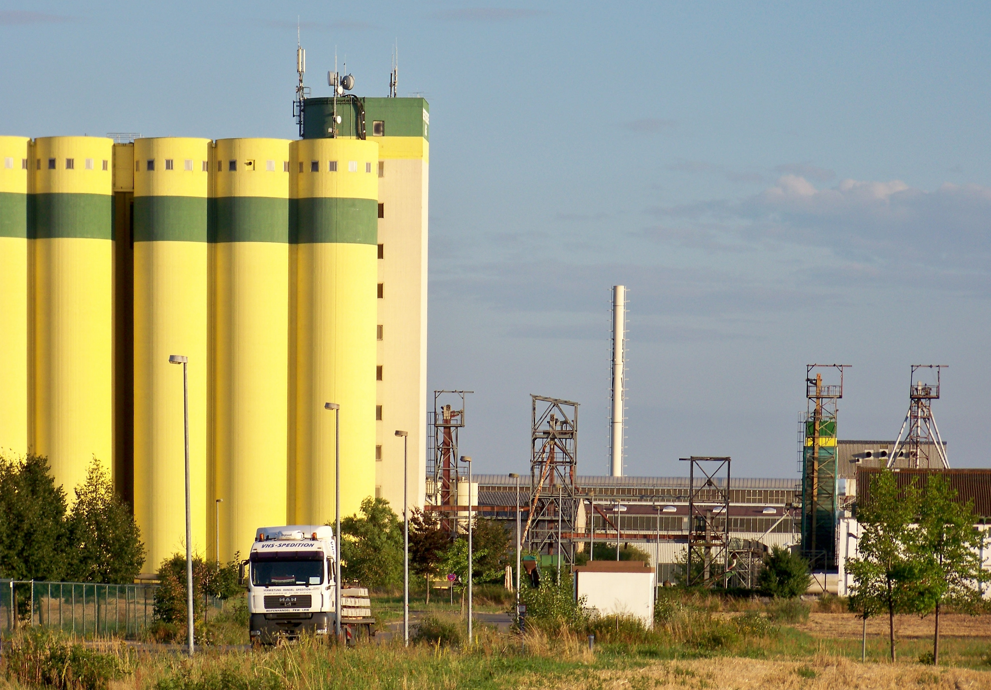 Blick aus der Straße Am Färberwerder auf das Betriebsgelände von Getreide AG und Eilenburger Baumaschinenwerke (EBAWE) im Gewerbegebiet Nordost in Eilenburg